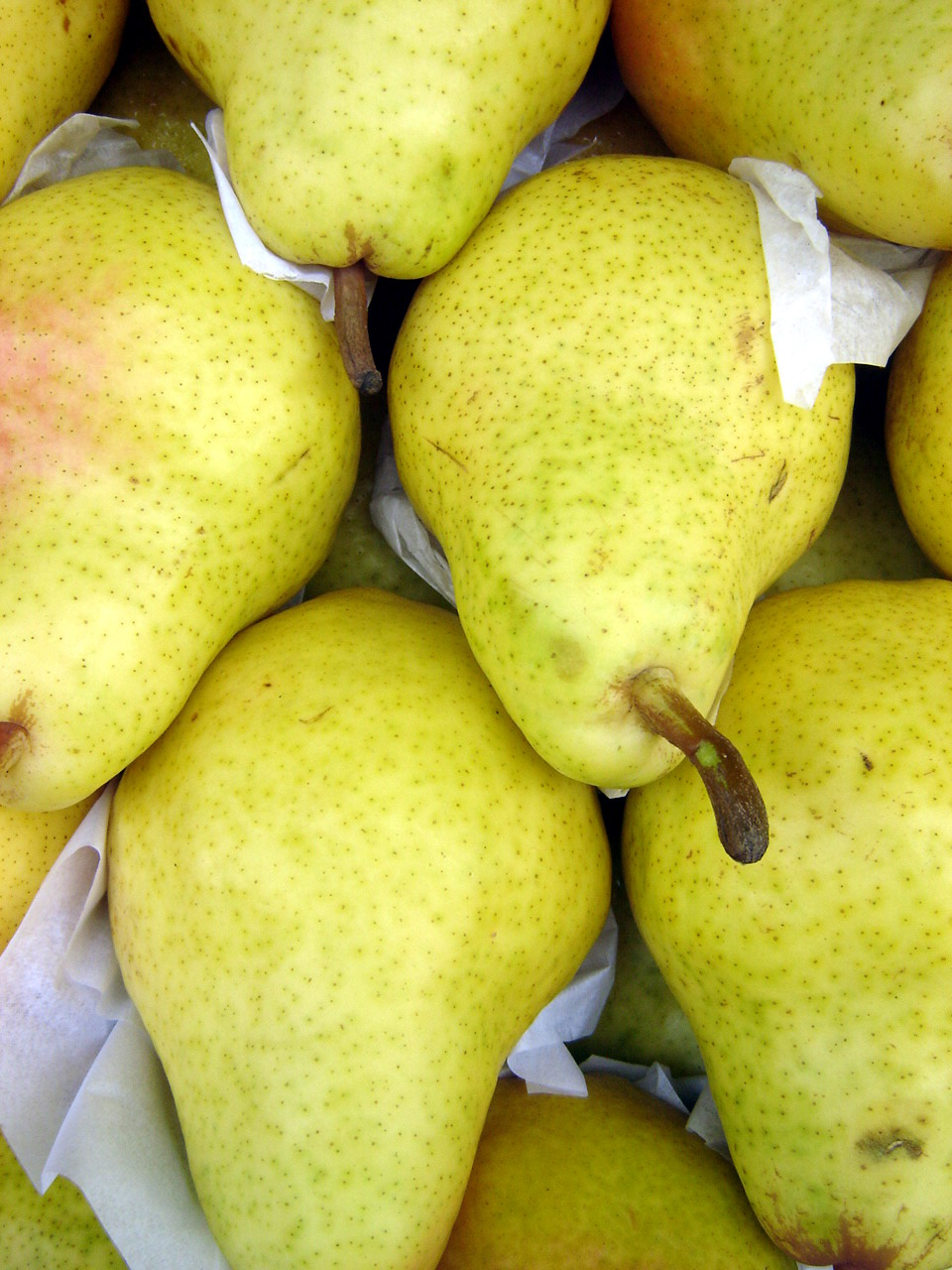 Photo taken in Buenos Aires, Argentina